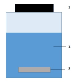 Montage pour SBSE: 1) Bouchon 2) Échantillon 3) Barreau pour SBSE